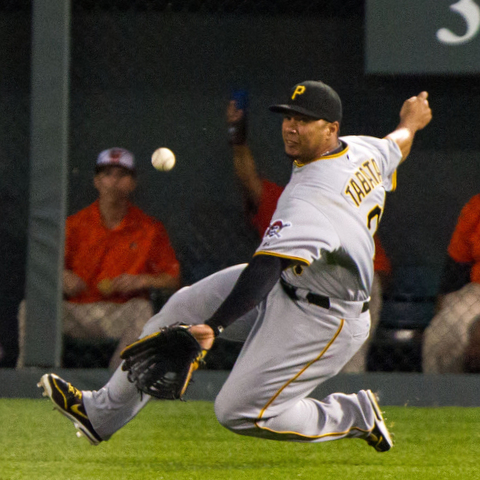 José Tábata